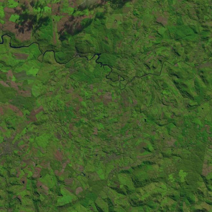 Cratera de Vargeão